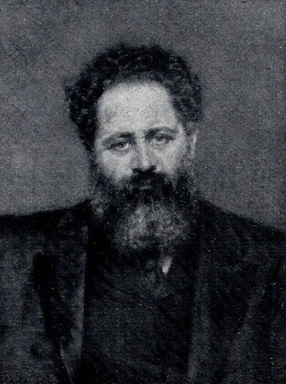 Professor Dr. Berthold Hatschek, 1910